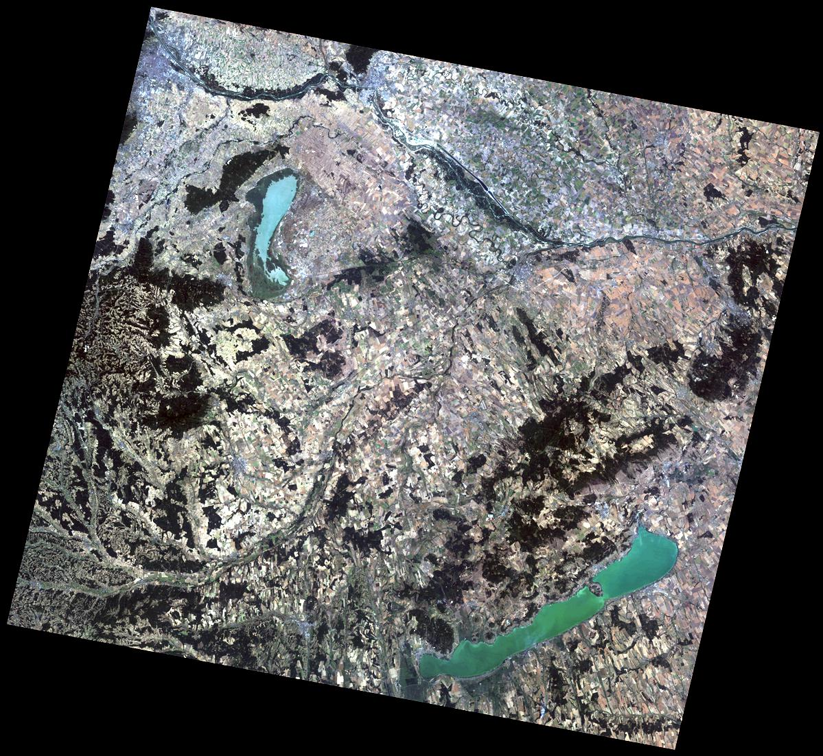 A Landsat-5 felvétele az Észak-Dunántúlról